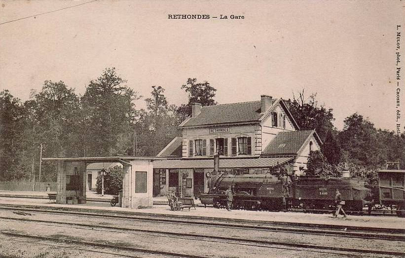 Train de marchandises en gare de Rethondes, quelques années après le début de l'exploitation.